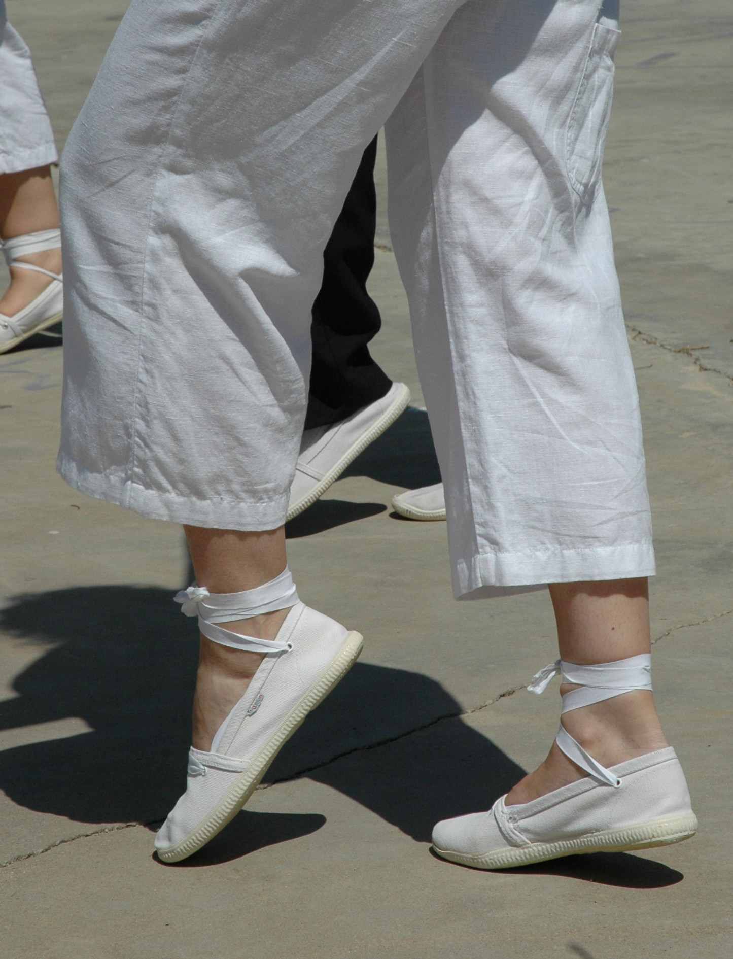 Sardana